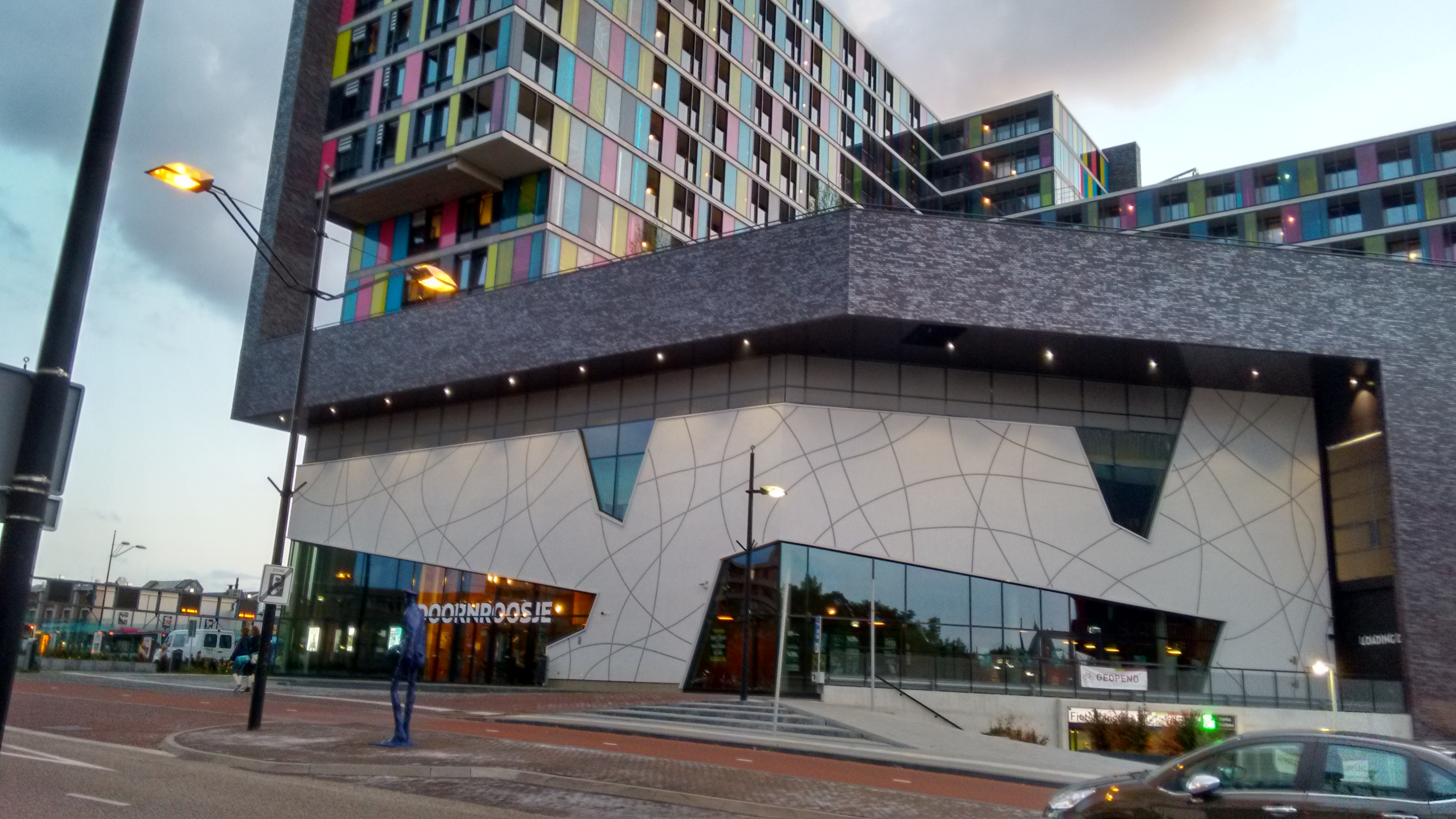 Poppodium Doornroosje en studentencomplex SSH& Talia op de hoek Stationsplein / Stieltjesstraat in Nijmegen. Op de voorgrond het beeld De blauwe diender van Ronald Tolman.